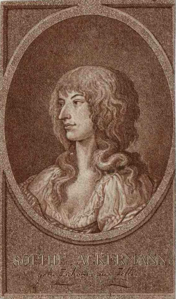 Sophie Charlotte Ackermann (1714–1792), Wien, Österreichische Nationalbibliothek, Bildarchiv und Grafiksammlung, Porträtsammlung, Inventar-Nr. PORT_00002511_01